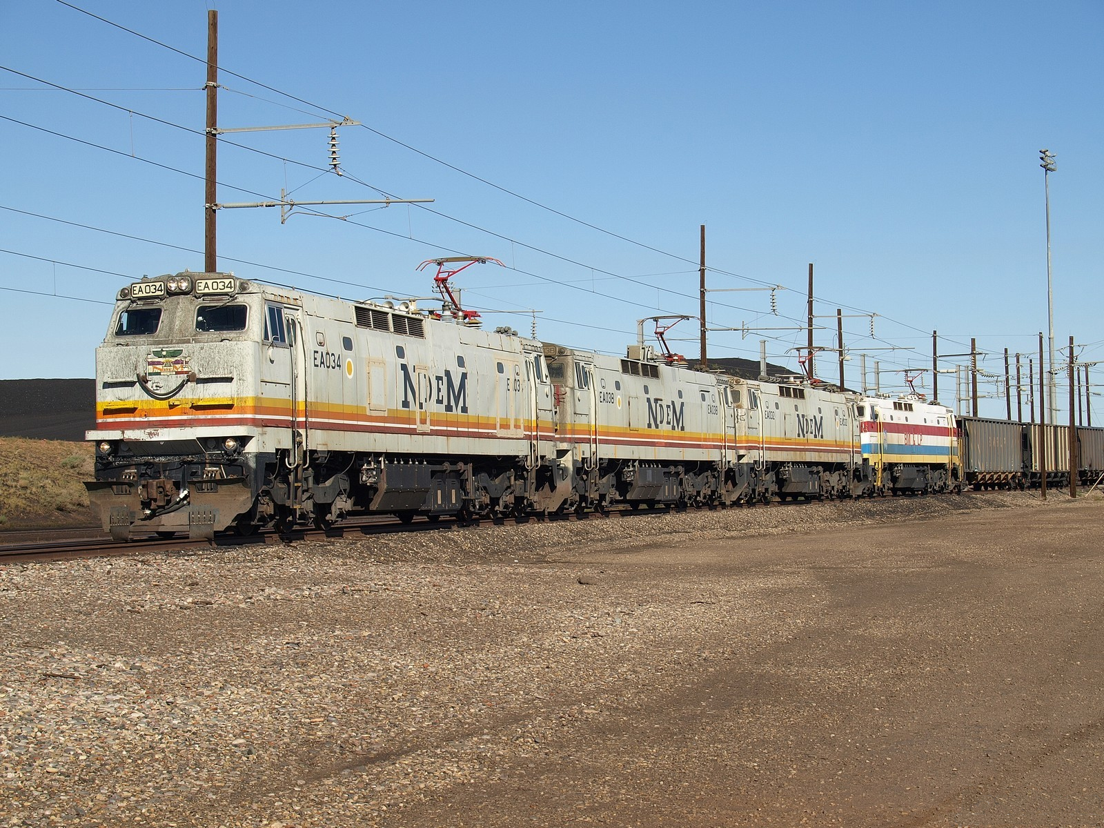 4 E60C-2 verlassen Page mit einem Leerzug